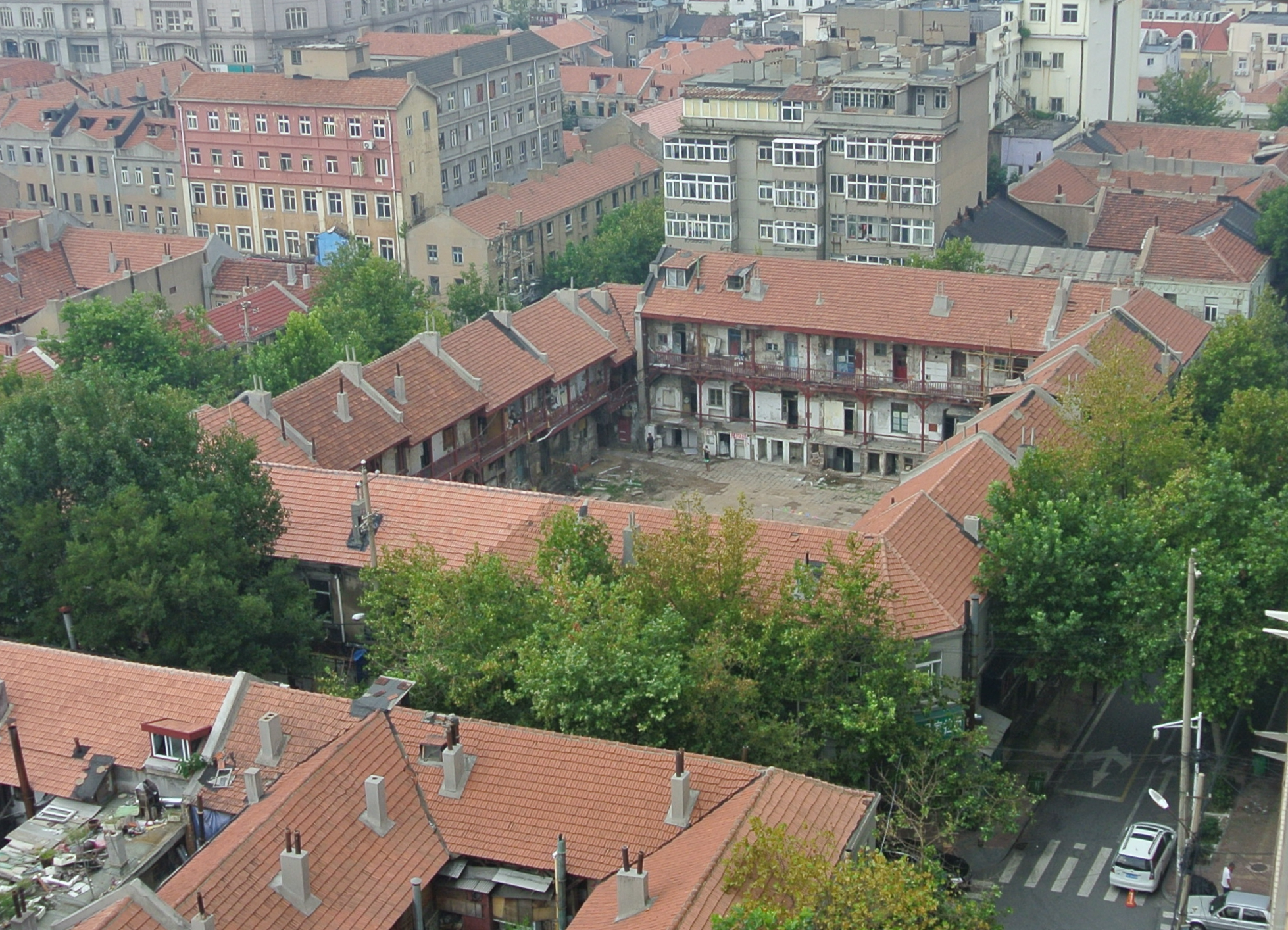 青岛广兴里俯瞰